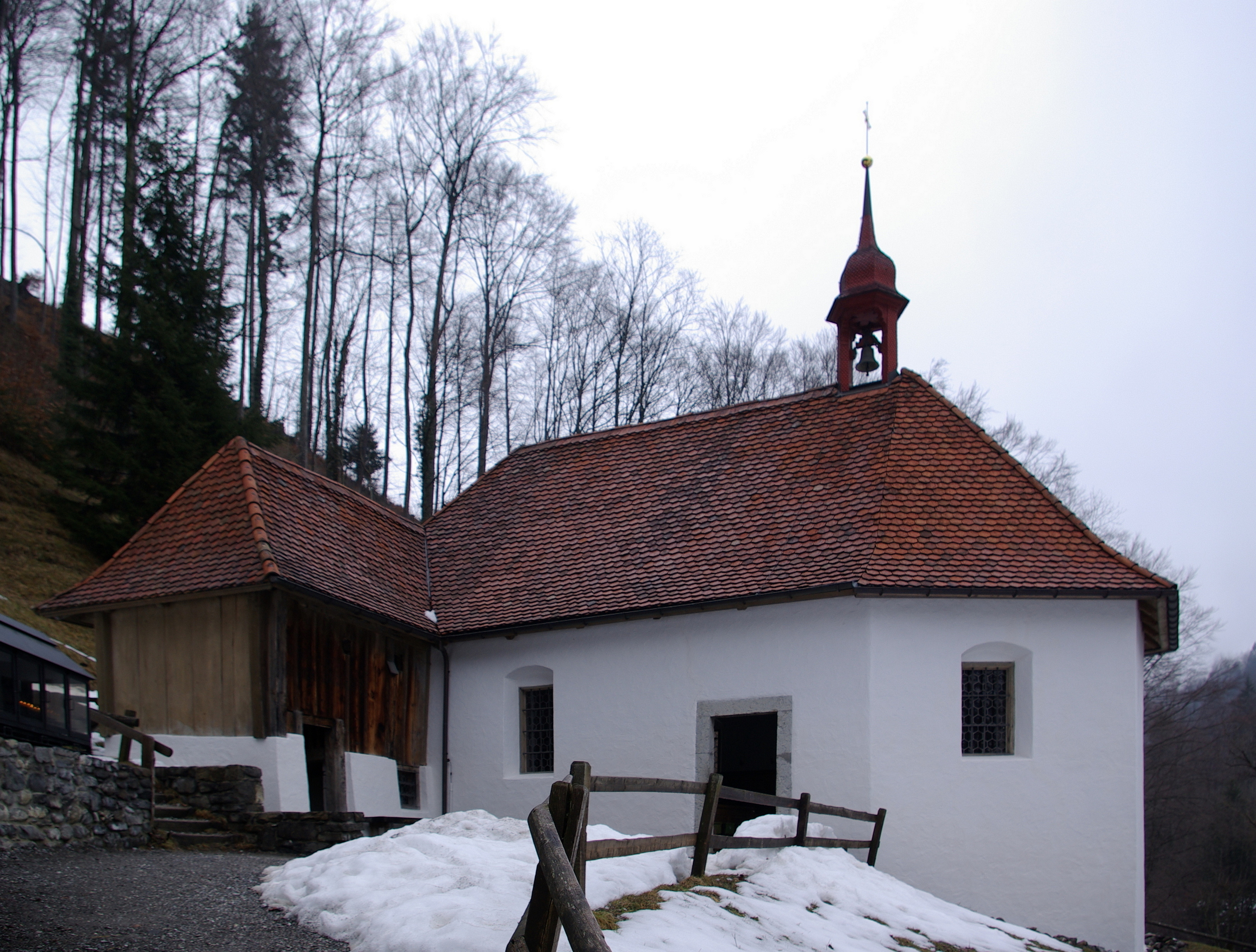 Flüeli-Ranft, Obere Ranftkapelle, links die Klause in der Bruder Klaus lebte